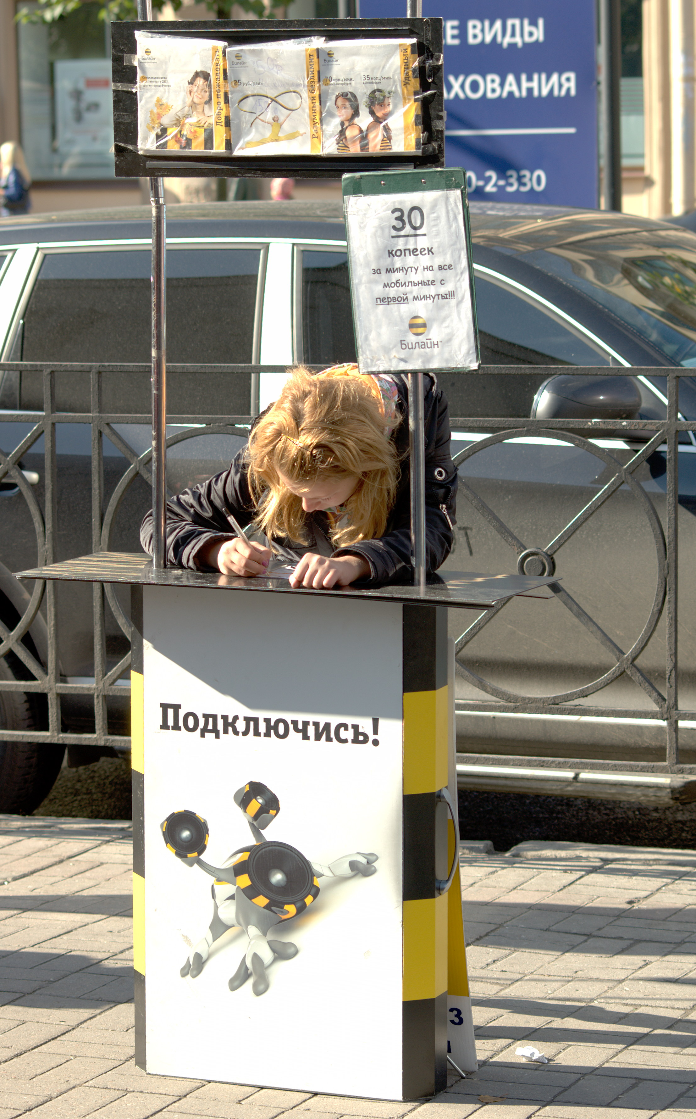 Точка продаж Beeline возле ст.м. Чернышевская